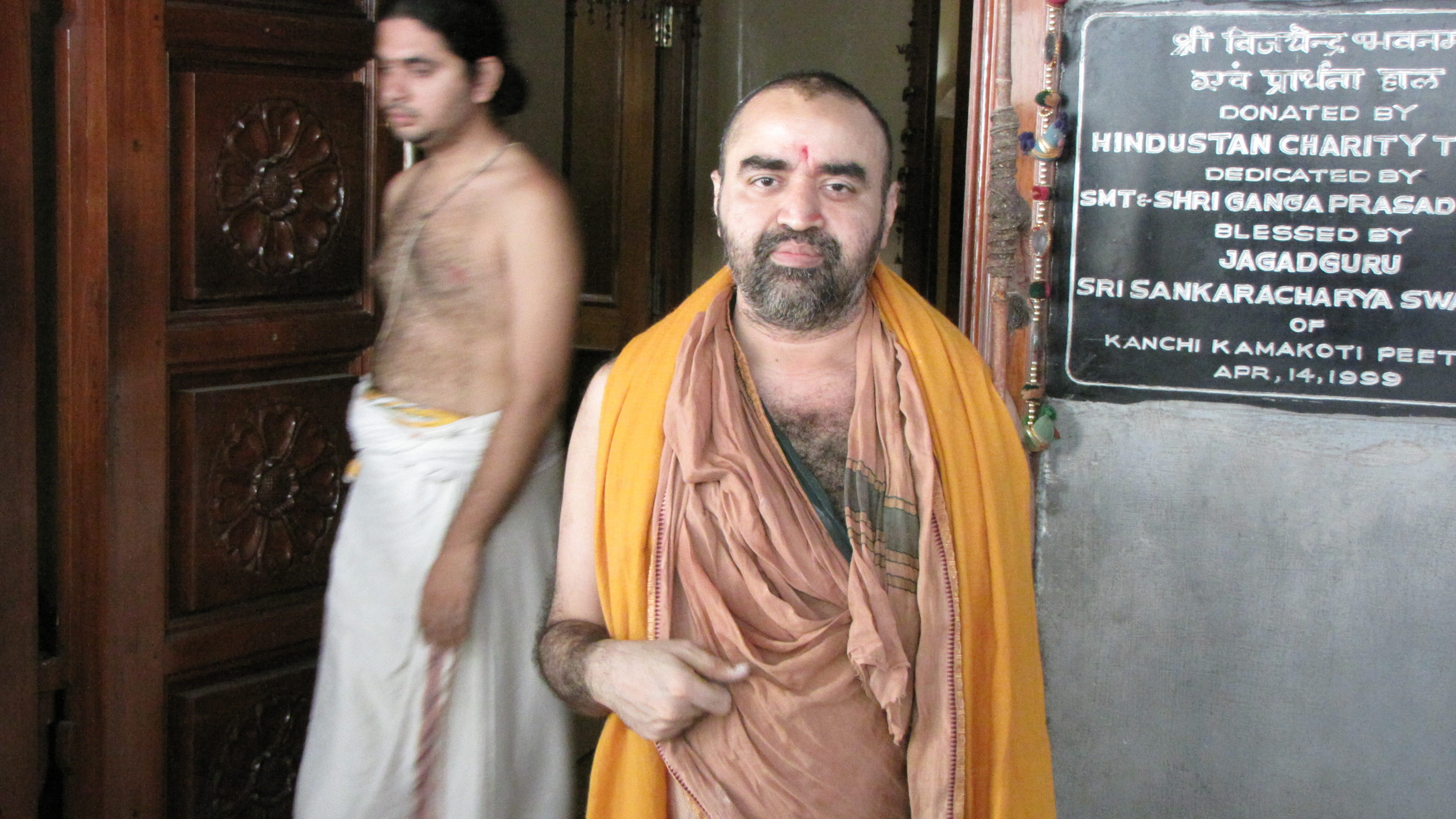 విజయేంద్ర సరస్వతి